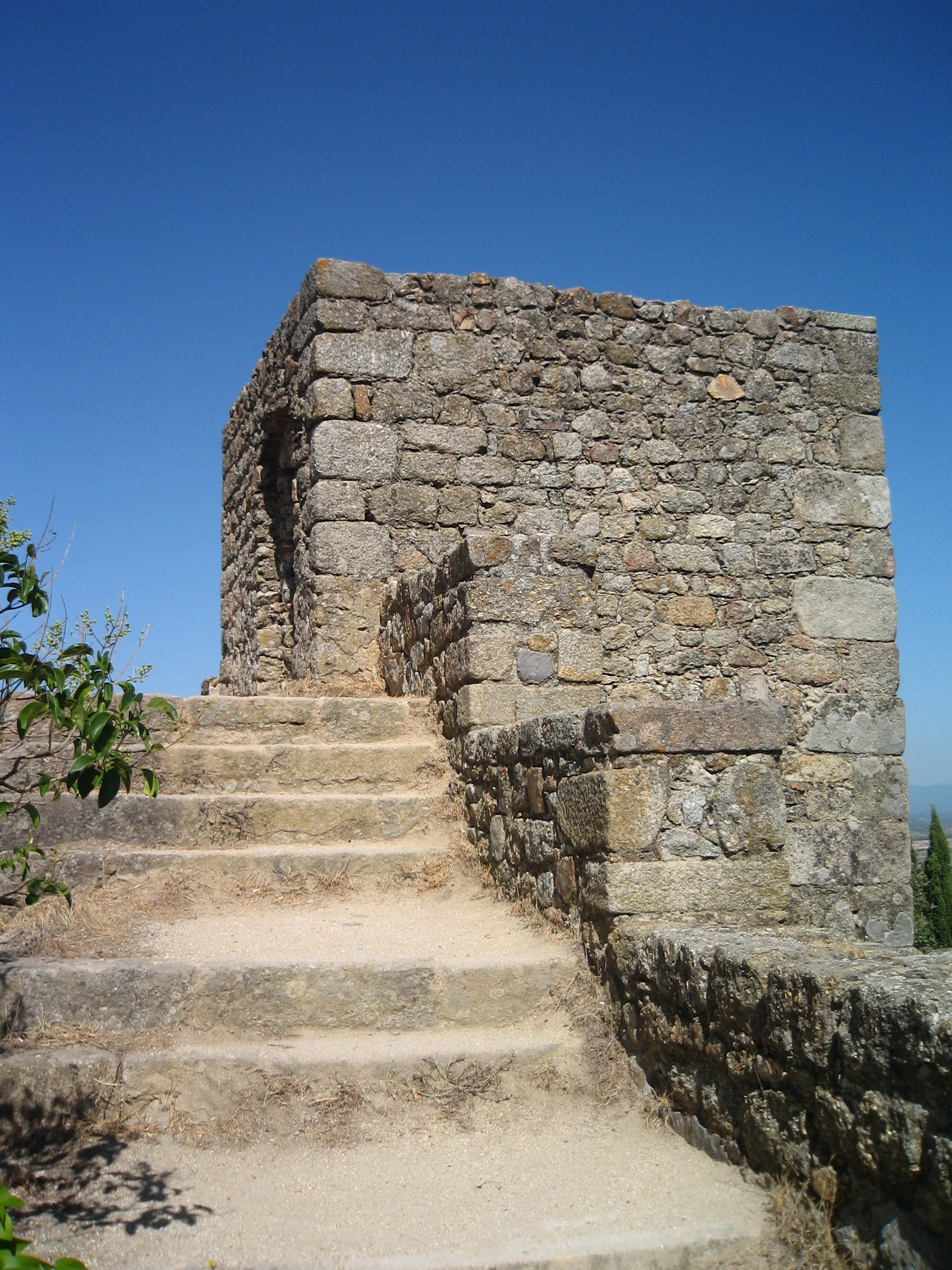 Muralhas do Castelo. Distrito de Castelo Branco. This monument is classified as Sem protecção legal. This file was uploaded for Wiki Loves Monuments in Portugal with the unique identifier 71175.